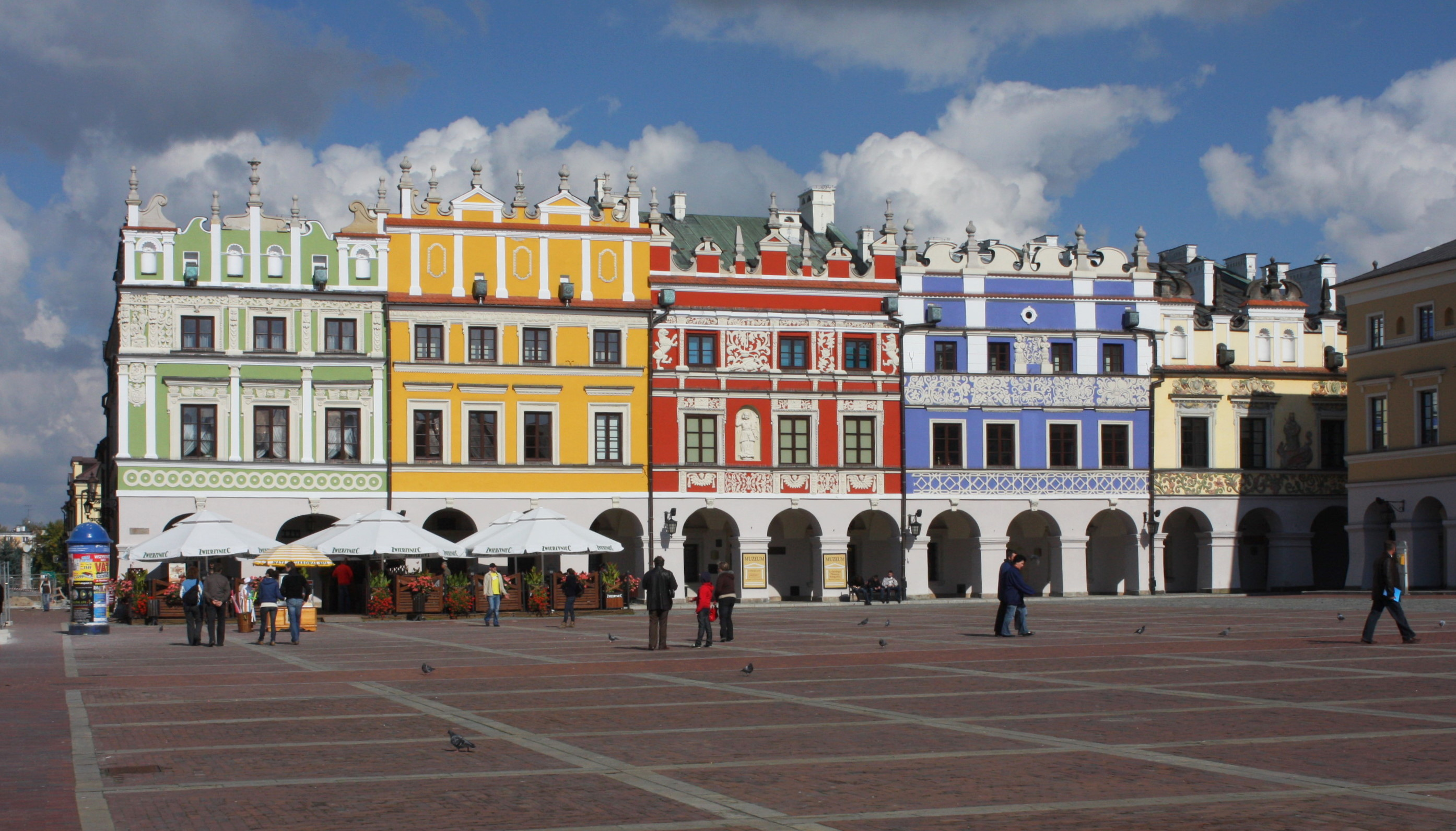 Kamienica "Pod Aniołem" (1 poł. XVII w., XVIII-XX w.), Kamienica "Rudomiczowska" (1 poł. XVII w., XVIII-XX w.), Kamienica "Wilczkowska" (pocz. XVII w., XVIII-XX w.), Kamienica "Pod Małżeństwem" (XVI/XVII w., XVIII-XX w.), Kamienica "Pod Madonną" (1 poł. XVII w., XVIII-XX w.) 02.1957 i z 22.